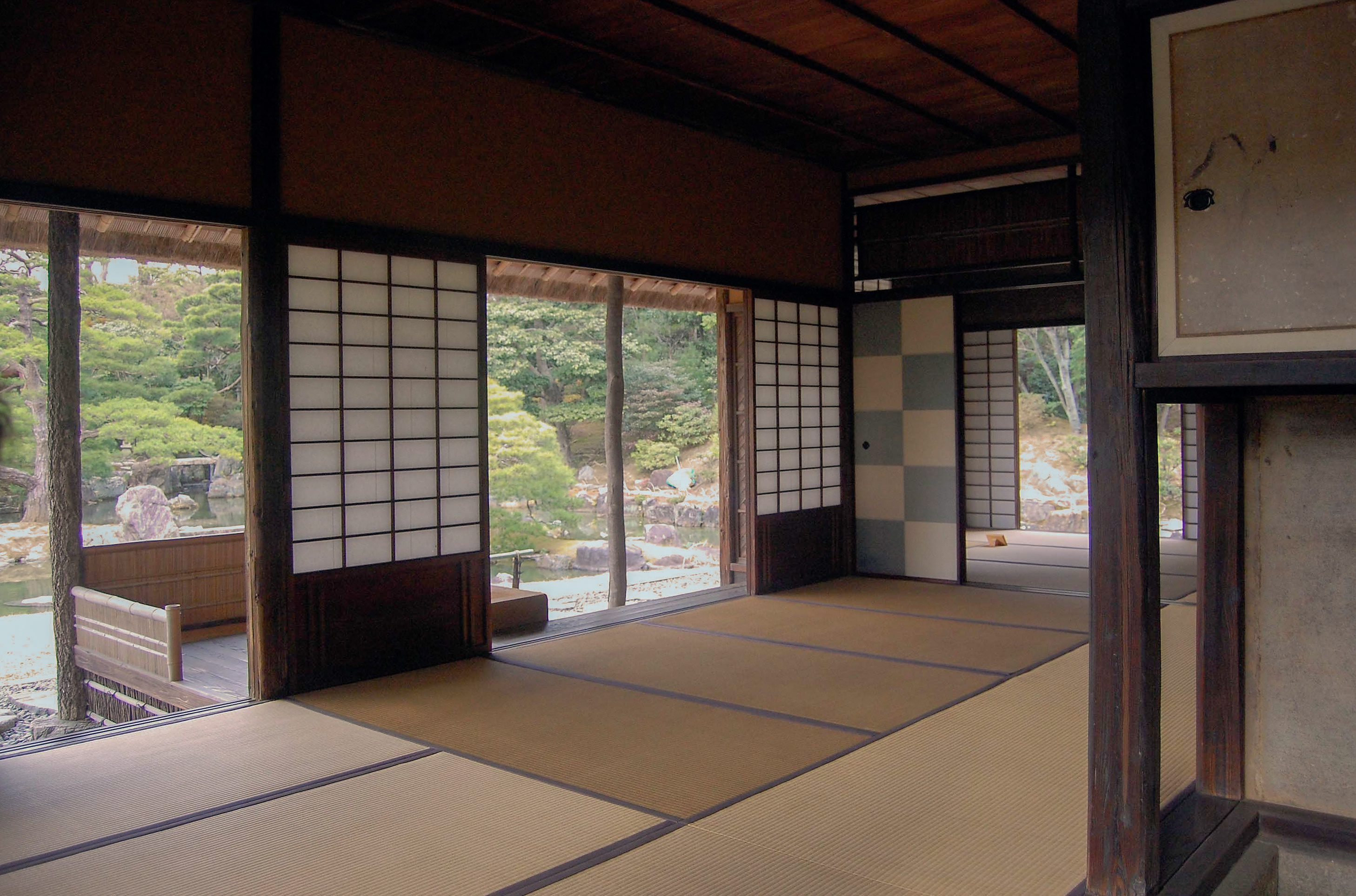 Shokin-tei tea pavillion